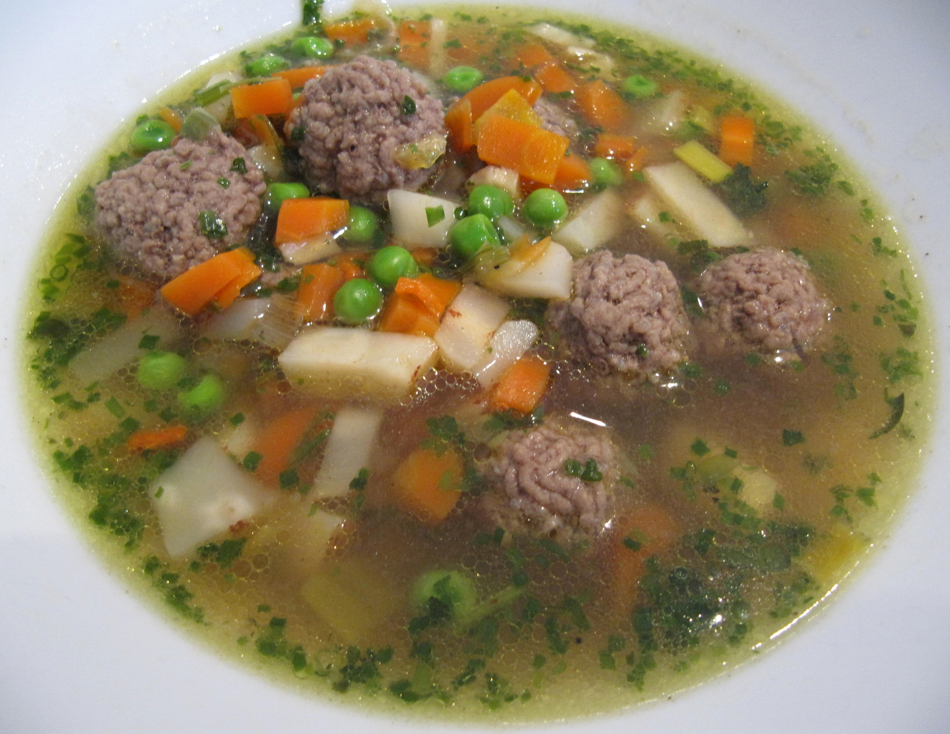 Eintopf, norddeutsche Art